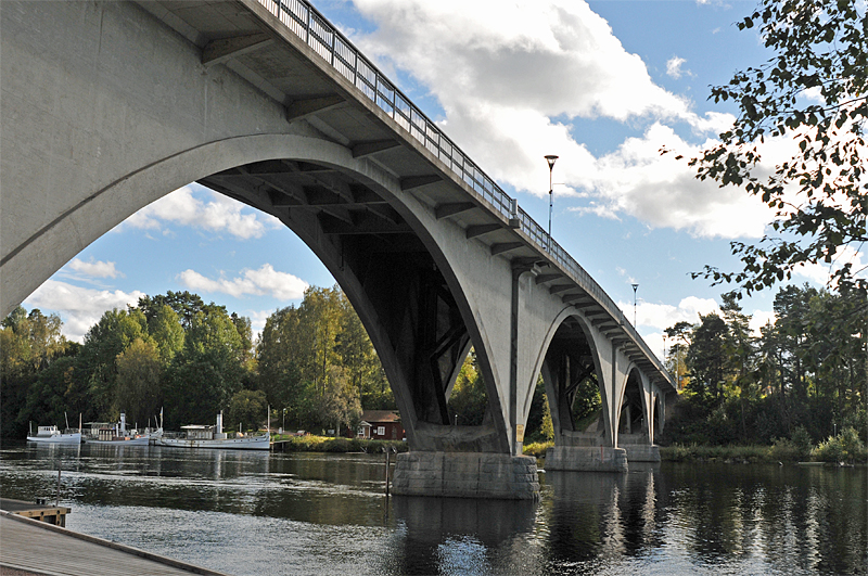 Leksandbron i september 2012